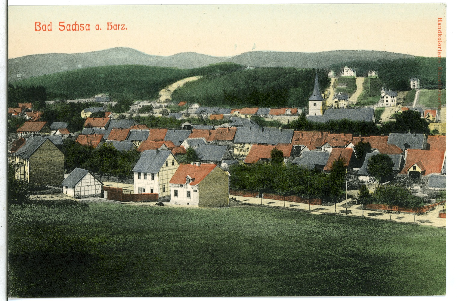 Bad Sachsa; Blick auf Bad Sachsa This postcard is from publisher Brück & Sohn in Meißen ( postcard has a unique number 09209 and is available in a higher resolution at the publisher. This images was uploaded in a cooperation project between Wikipedians and the publisher.